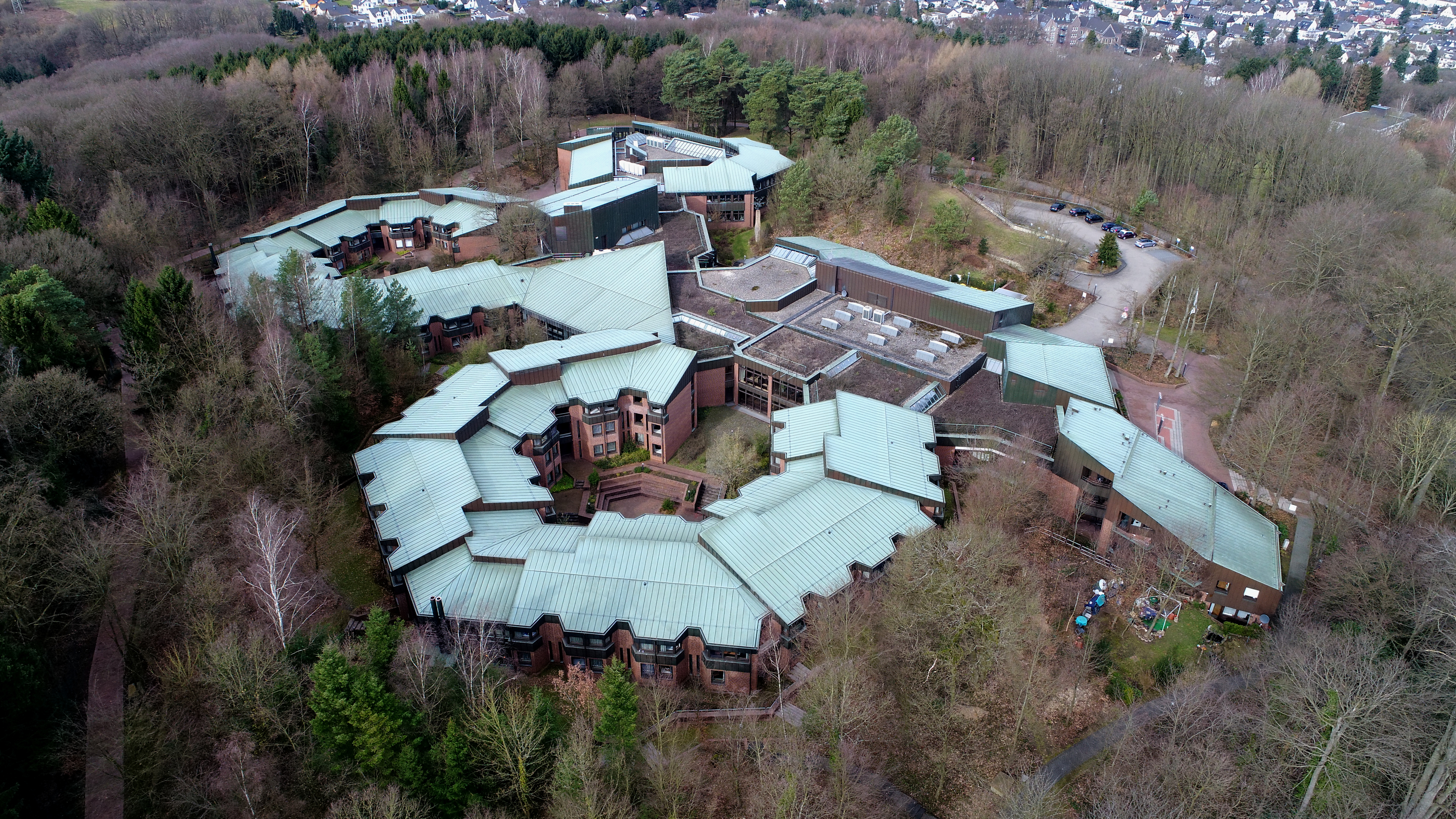 Deutsche Gesetzliche Unfallversicherung, Akademie Hennef, Luftaufnahme (2017)